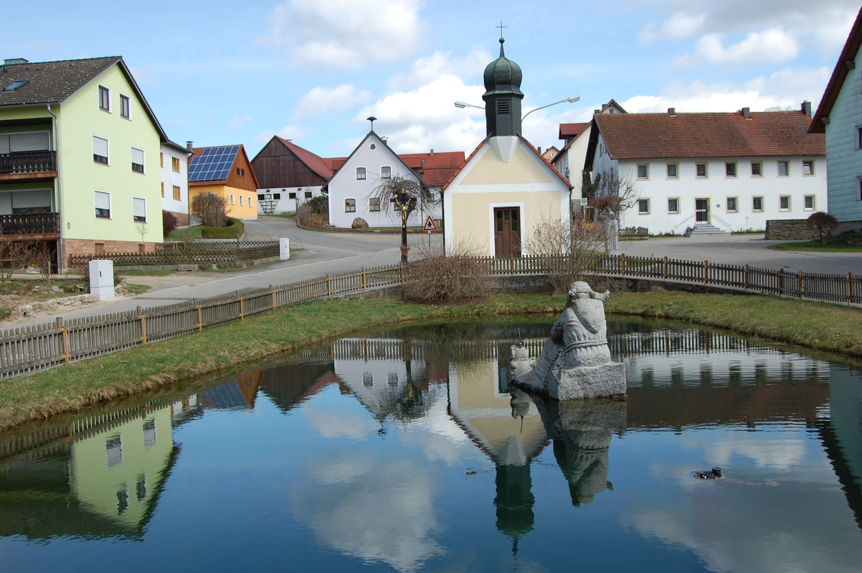 Ortsmitte Zeinried, Gemeinde Teunz, Landkreis Schwandorf (Bayern)